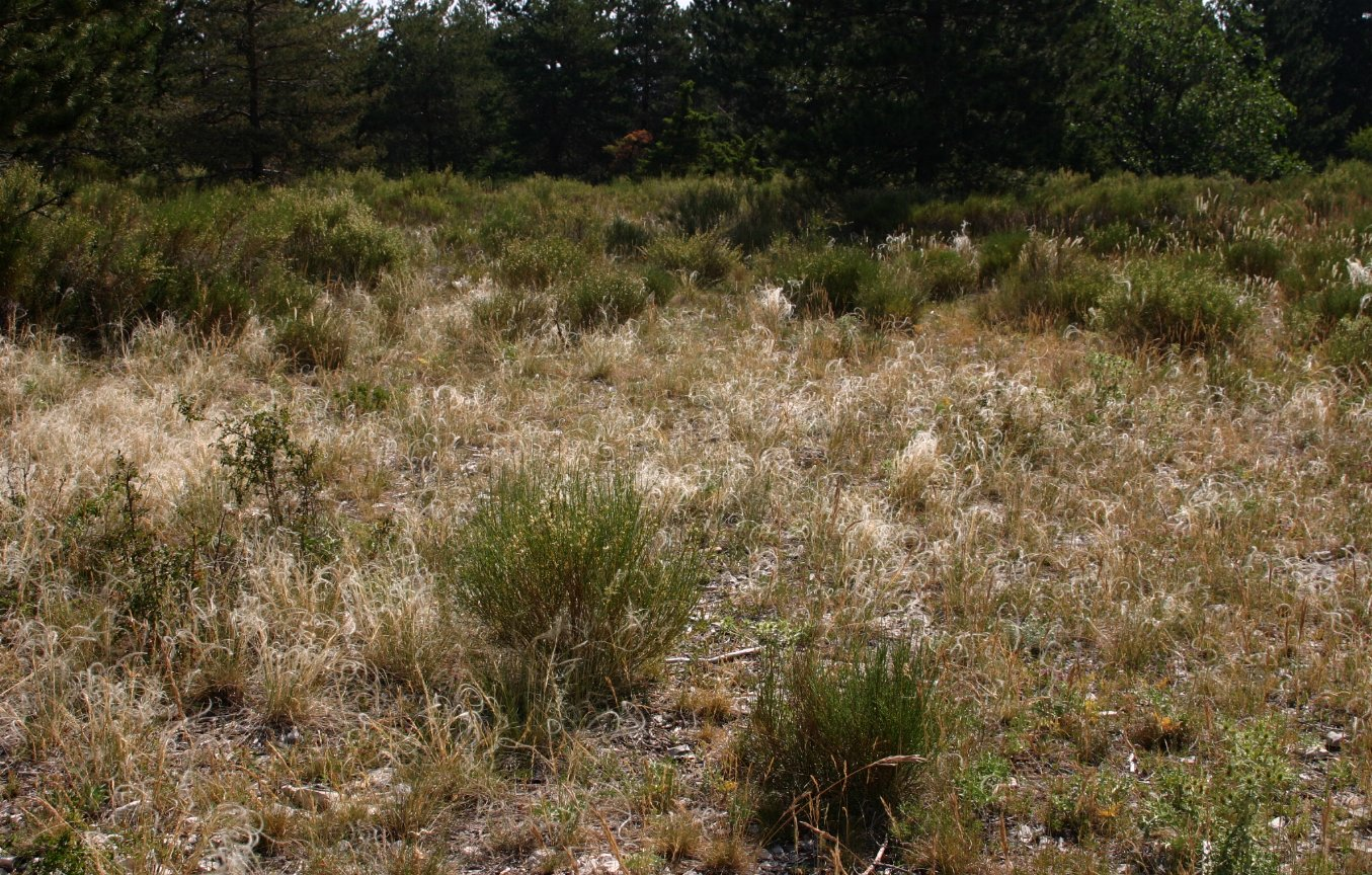 Stipa pennata: Habitat